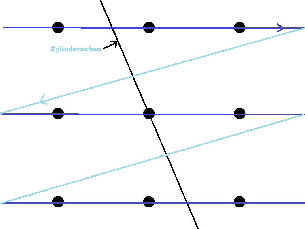 9-Punkte mit einer Gerade lösen, Zylinder